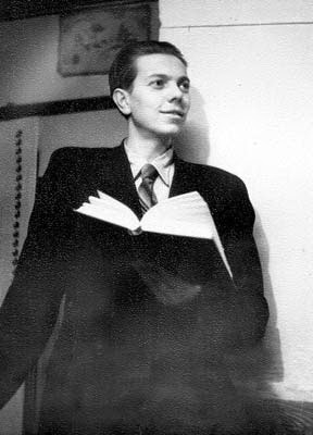 У. Караткевіч у студэнцкія гады [1949-1954 гг.].